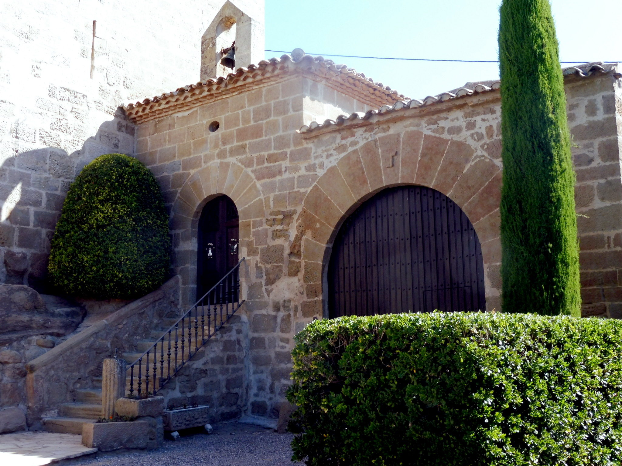 Castellblanc (Oliola): capella del Roser